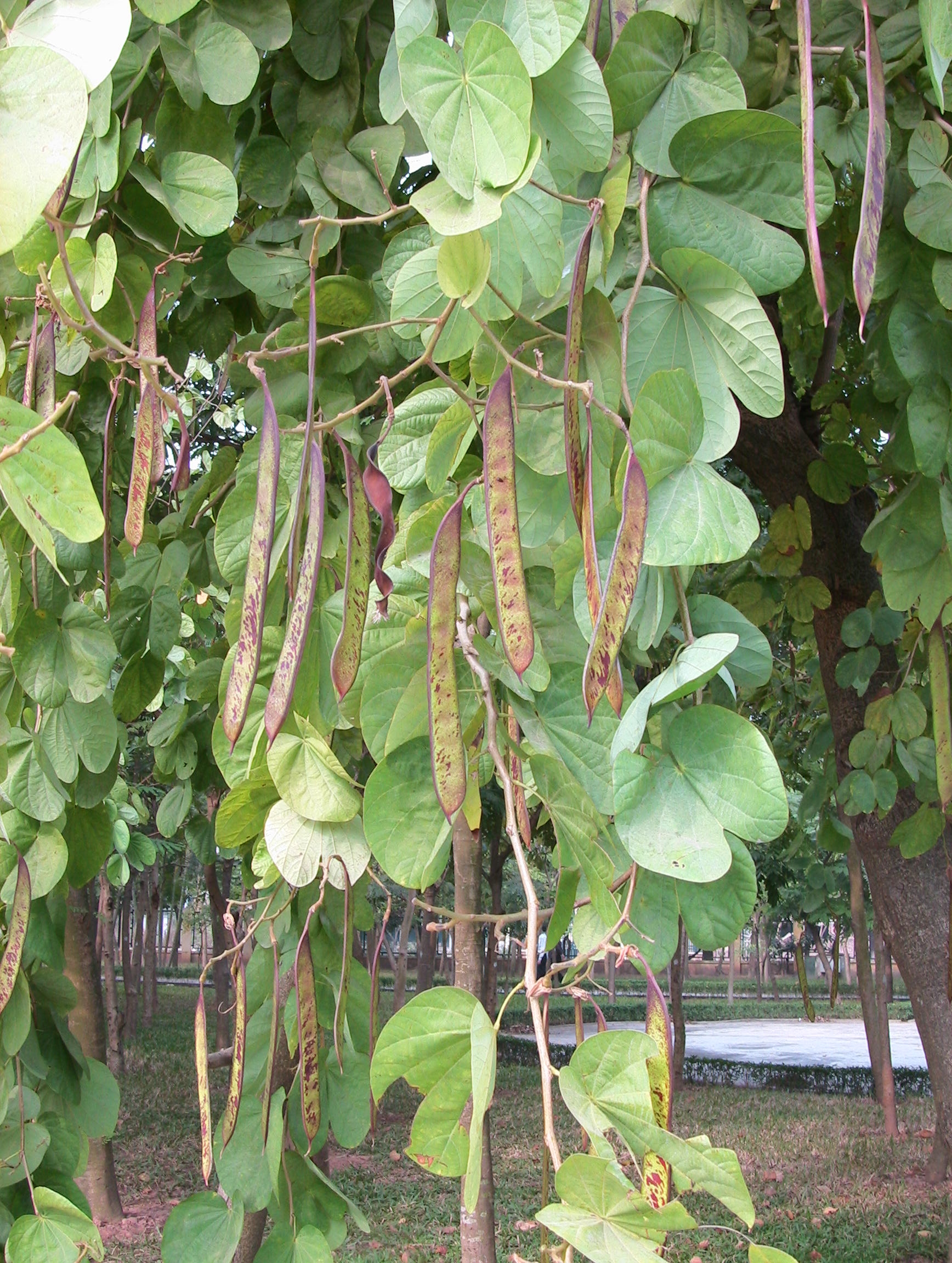 Quả của cây hoa ban đỏ